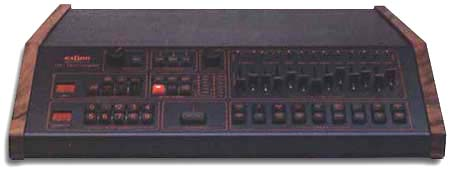 Drum machine Linn LM-1 Licensing Categoria:Drum machines